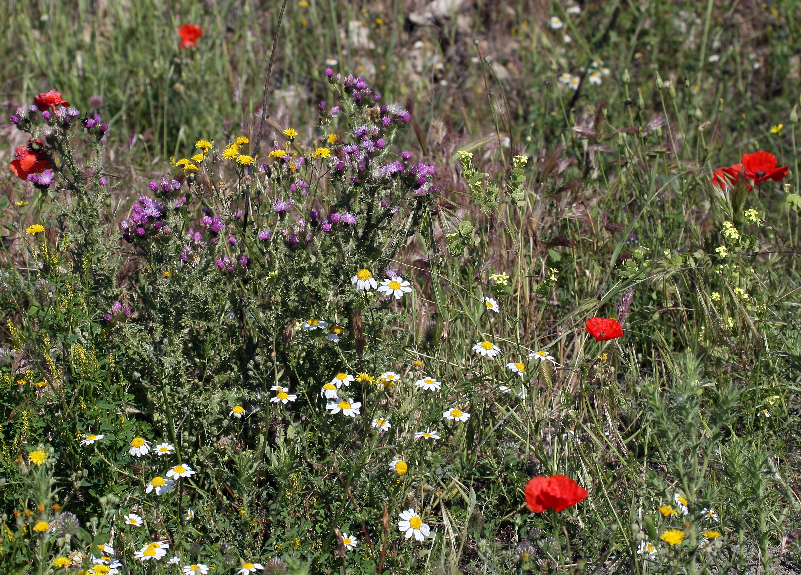 Aspecto típico de la «Campiña Madrileña» en Mayo - Con, entre otras, Biscutella auriculata (Anteojos) - Estanques del Arroyo de Rejas (Madrid).